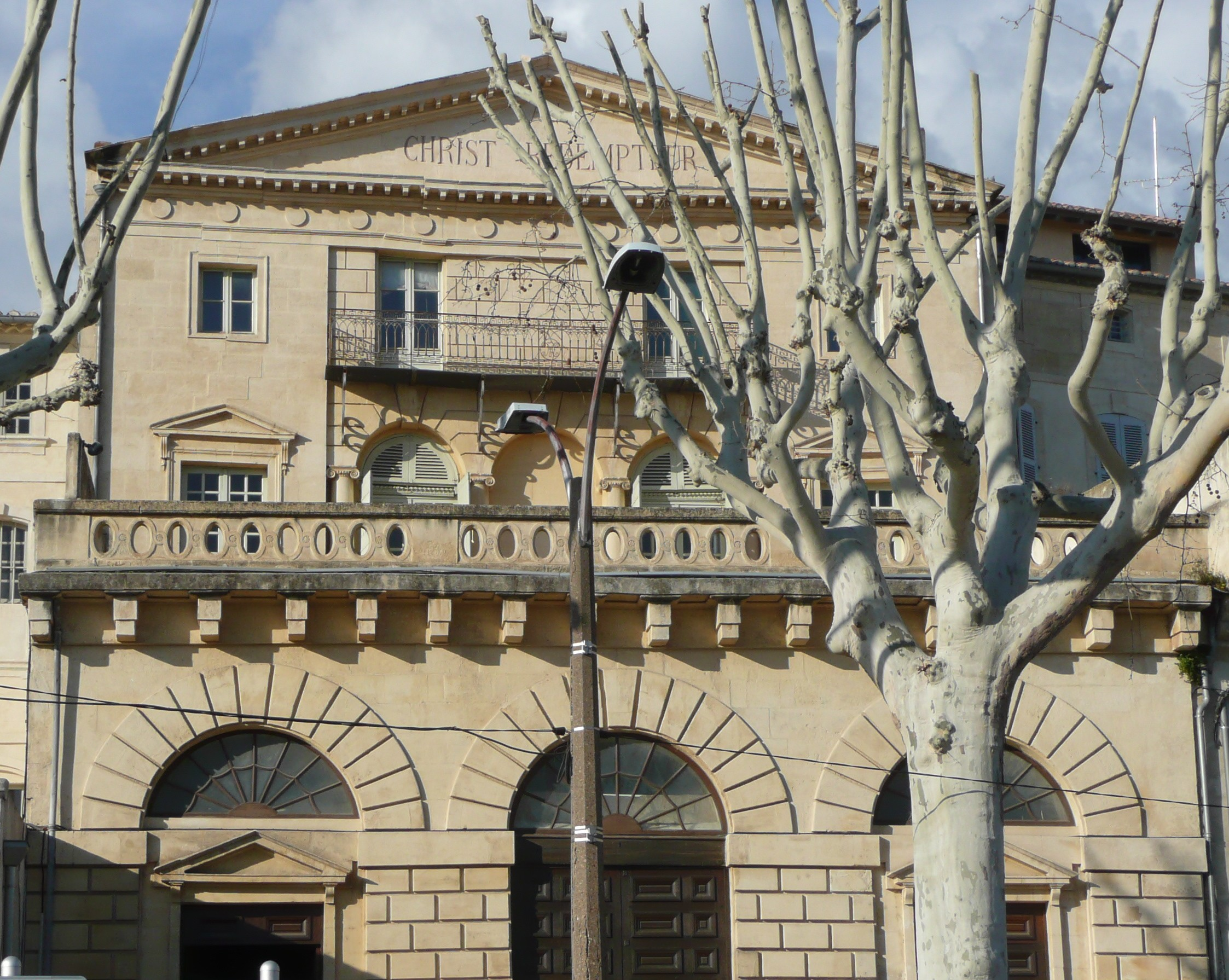 Arles (Bouches-du-Rhône_France), boulevard des Lices, ancien cercle de la Rotonde, désormais temple de l'Église Réformée du Pays d'Arles, façade sud.